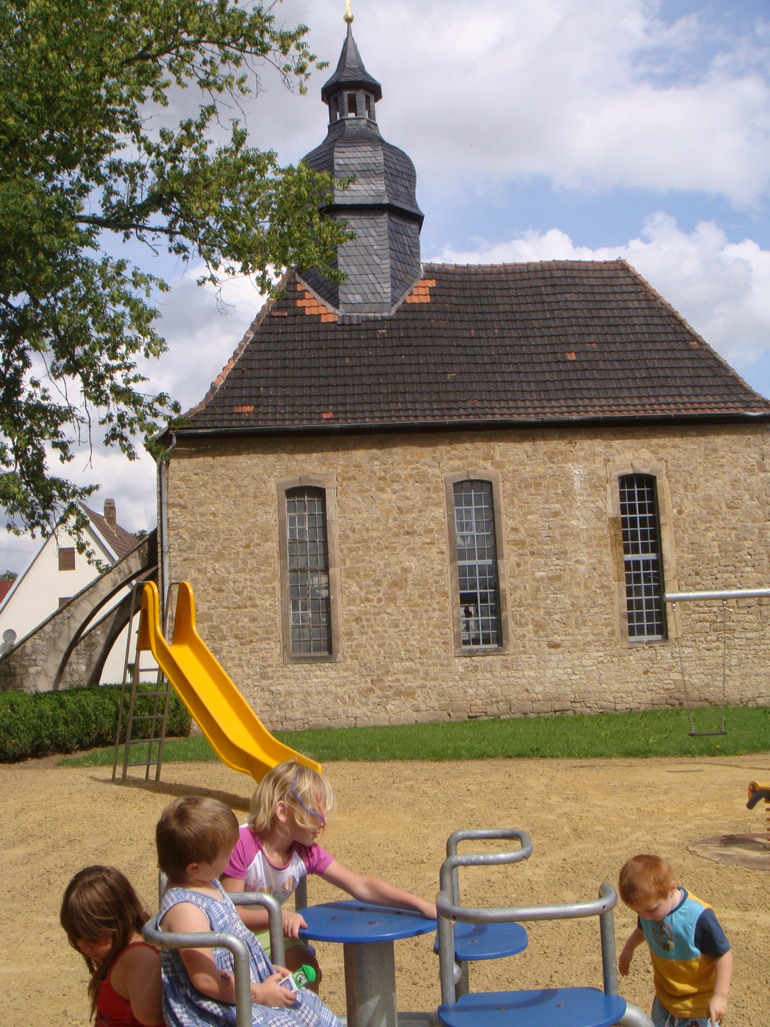 Außenansicht Dorfkirche